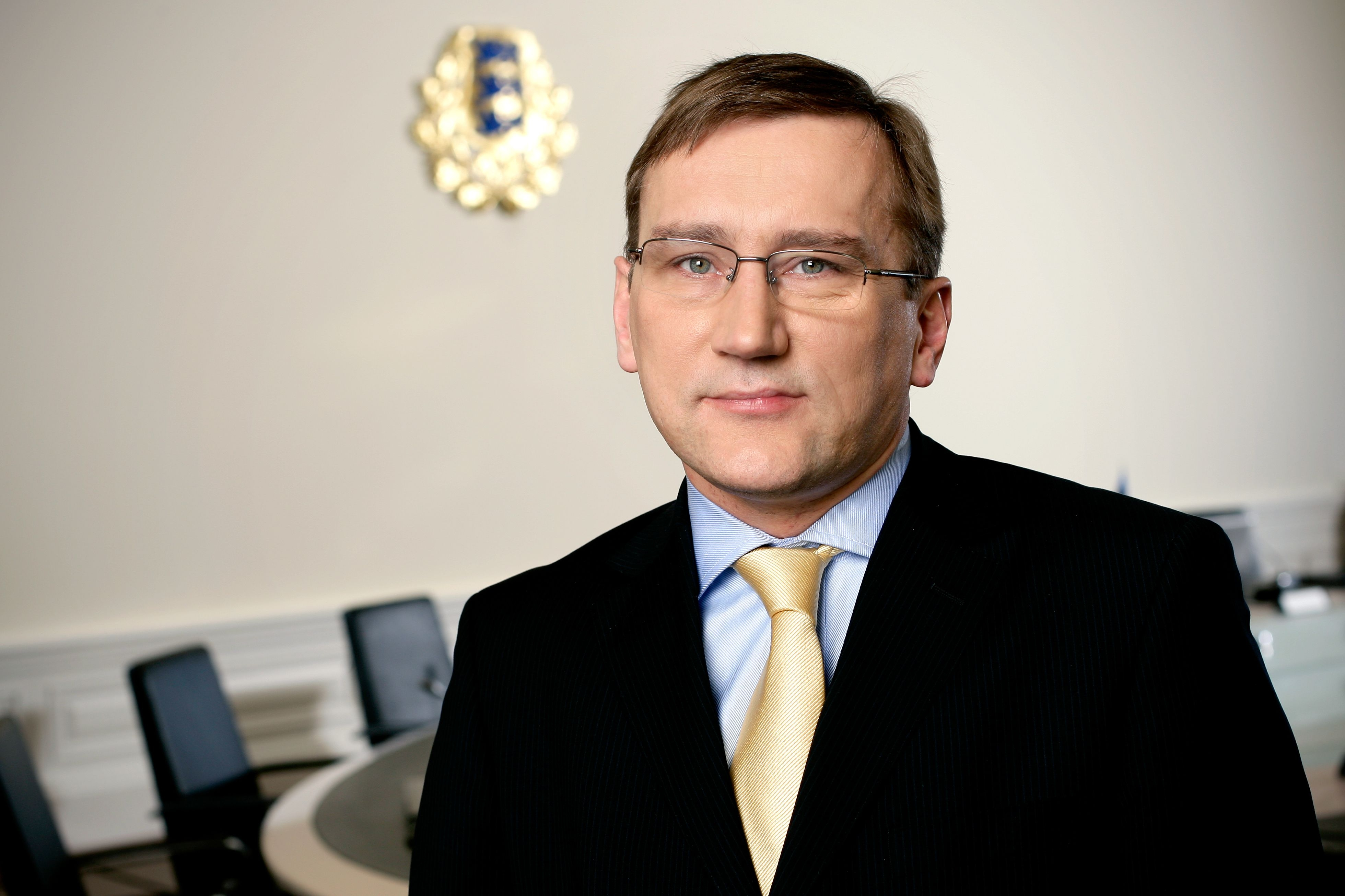 Juhan Parts